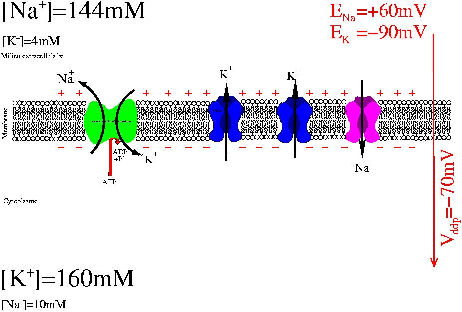 Schéma illustrant le potentiel de membrane, fichier xfig d'origine disponible